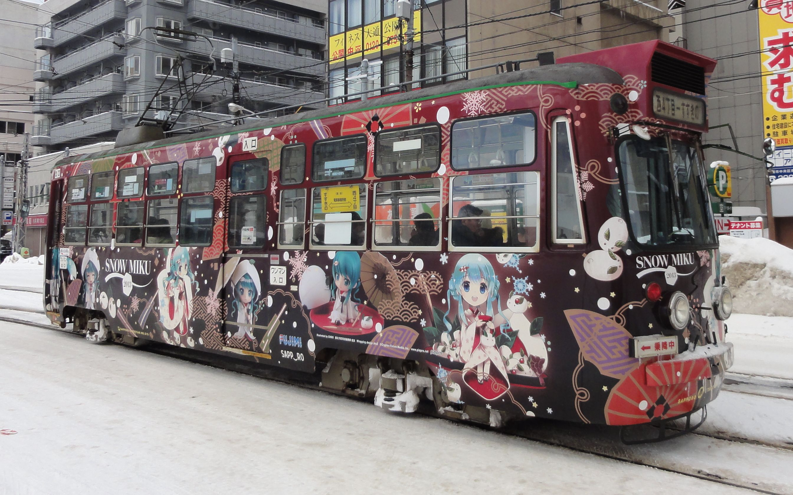 札幌市交通局210形電車 「雪ミク」ラッピング